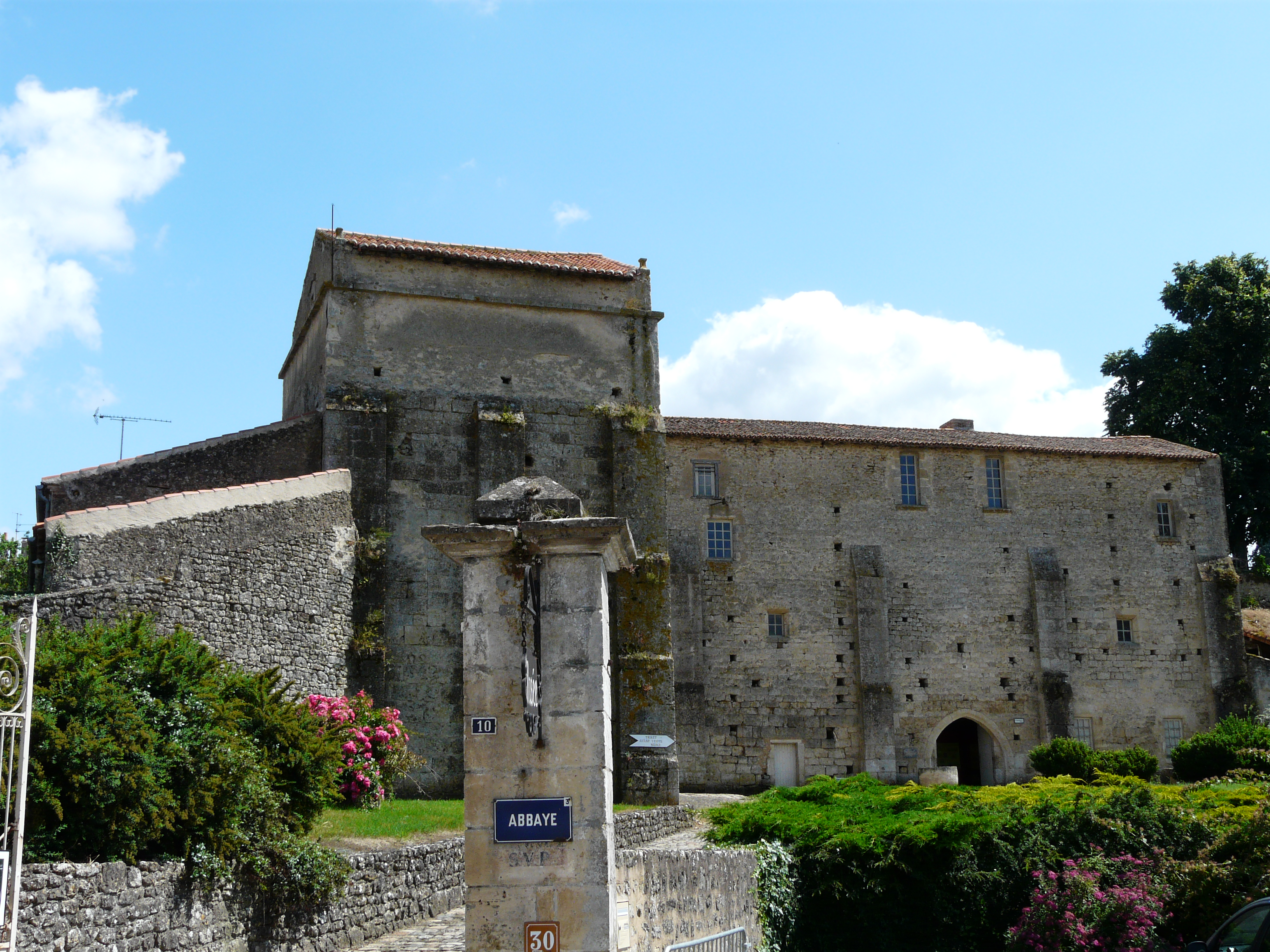 Bâtiments de l'ancienne abbaye, Airvault, Deux-Sèvres, France